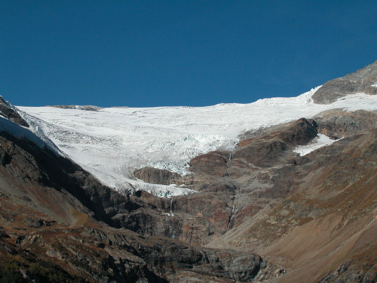 Palü Gletscher 2003